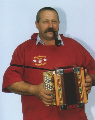 Paul Lüönd. Mitglied beim SQ Mosibuebä, Retomons und Waschi GmbH und der Zündhölzlimusig. Wohnhaft in Ingenbohl Kanton Schwyz.